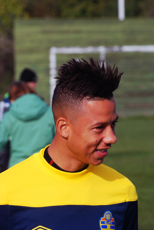 Tobias Sana på landslagssamling den 10 oktober 2012 på Karlberg (AIK:s träningsplan)